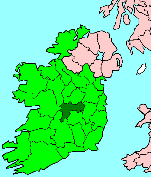 Offaly